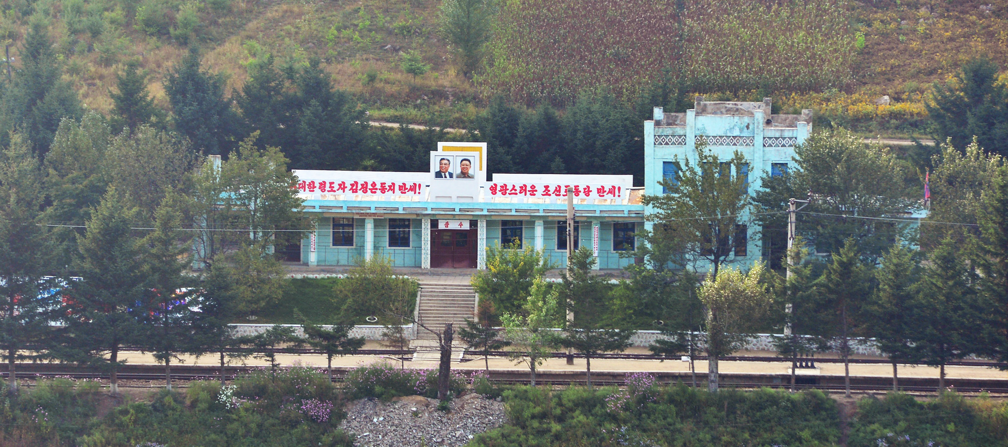 两江道三水青年站